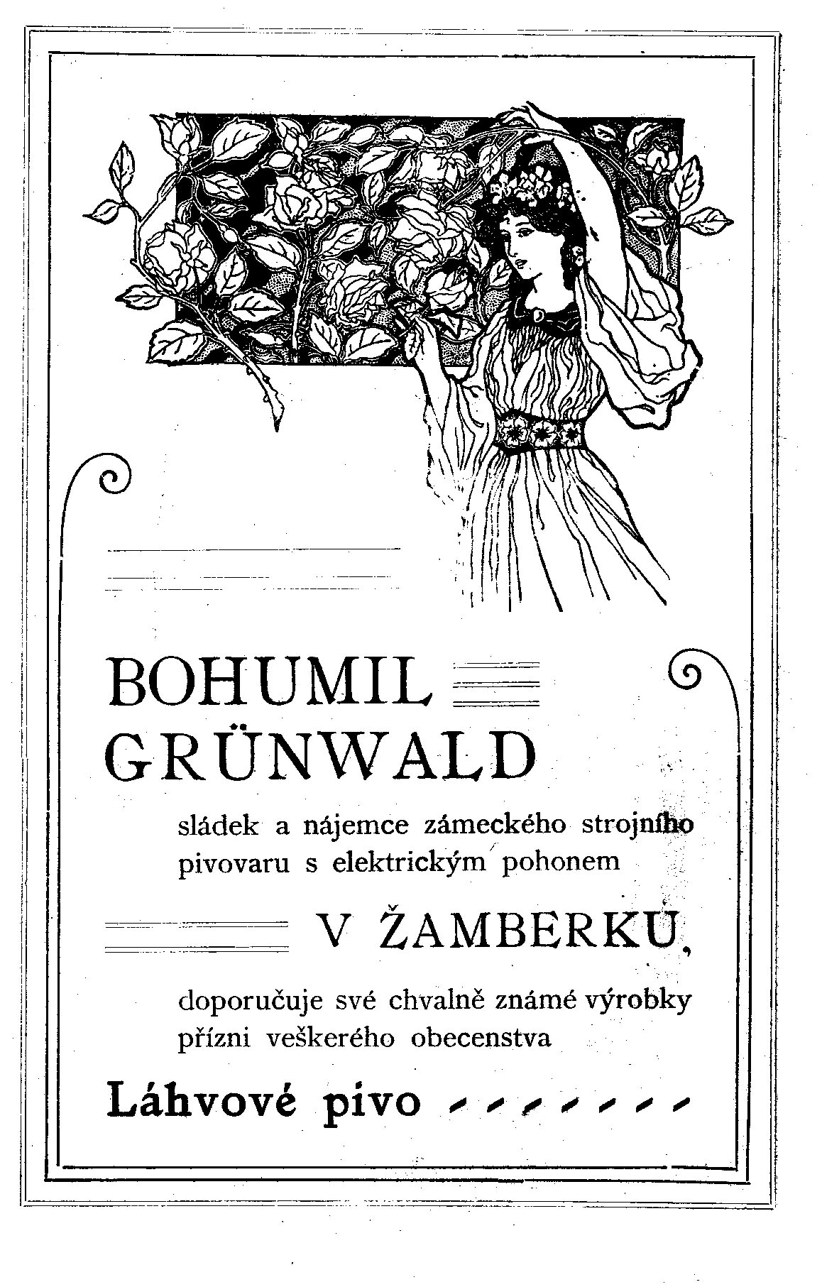 dobový reklamní leták nájemce pivovaru v Žamberku